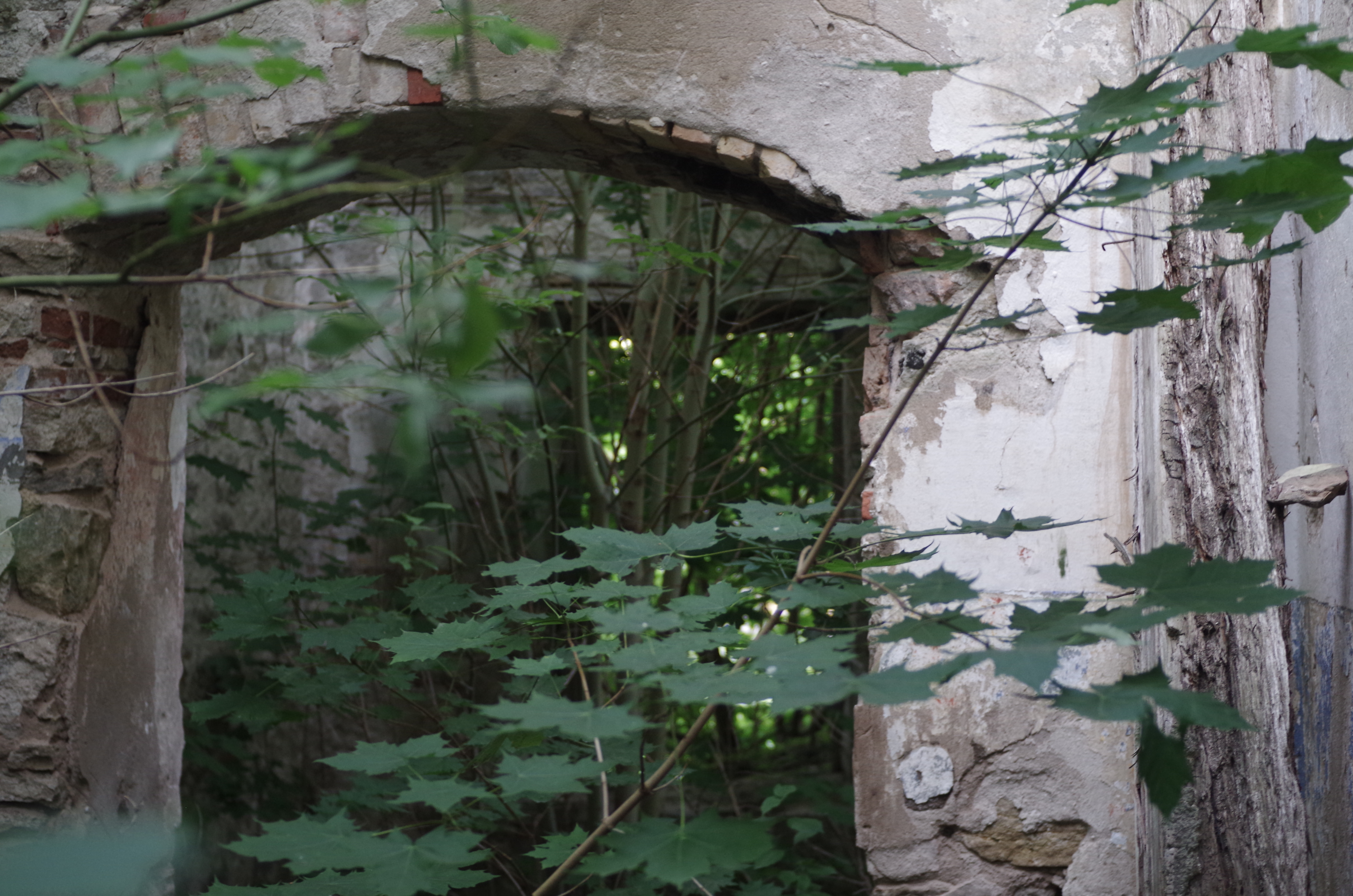 Pilt aastast 2014. Kasti küla, Kaarma vald, Saare maakond.